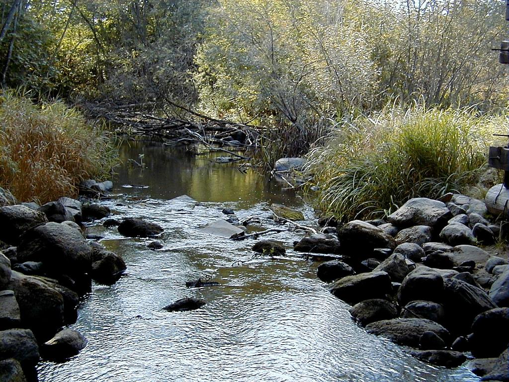 Vaidava pie Ziemeru - Alūksnes ceļa 2002-09-13